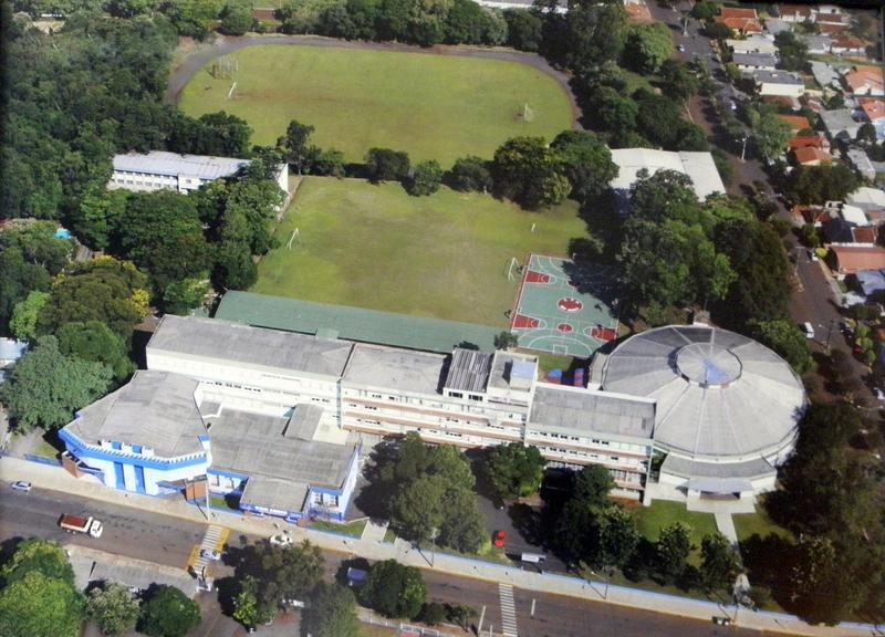 Foto aérea do Colégio